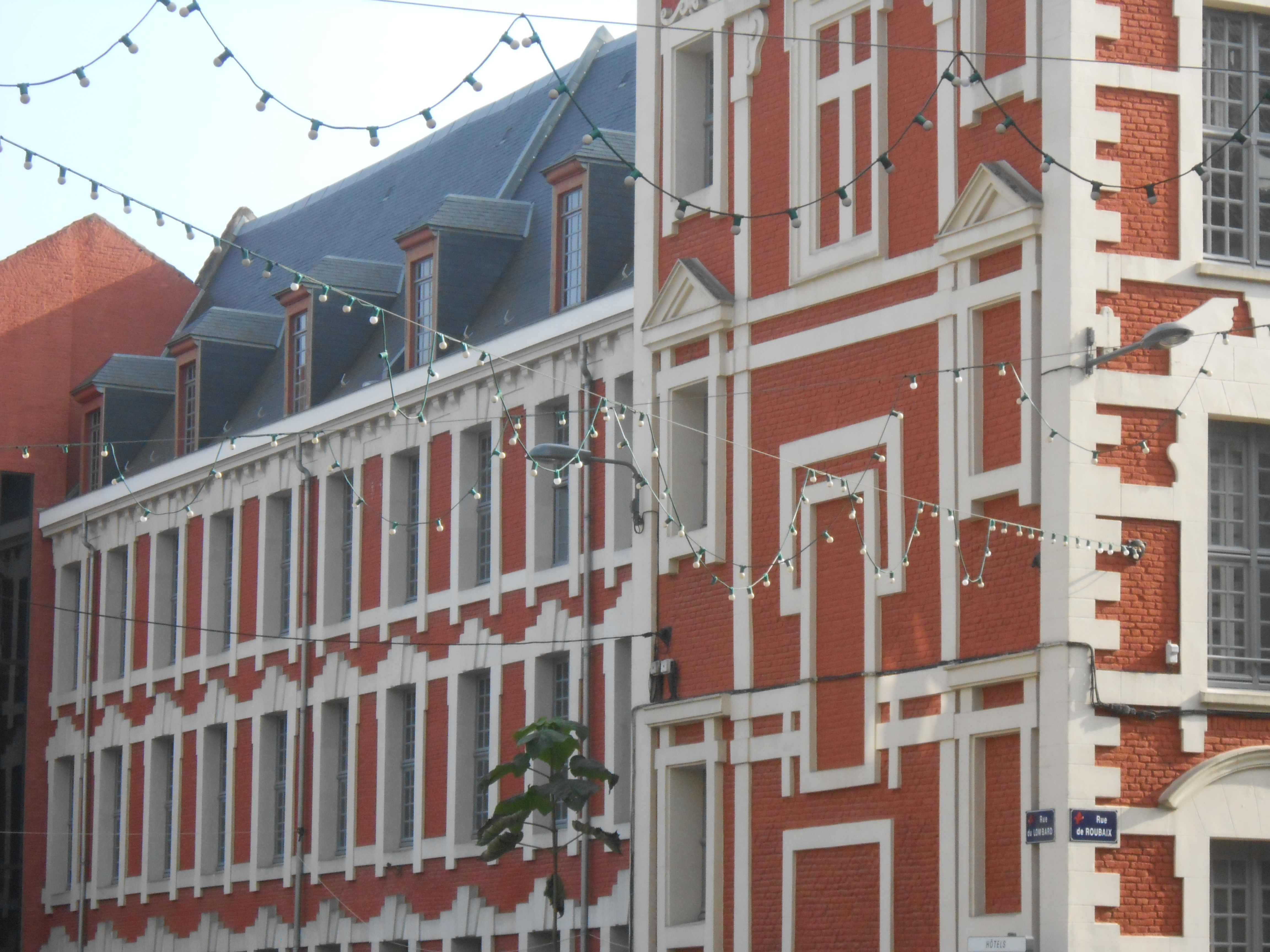 Ecole des arts industriels et des mines Lille